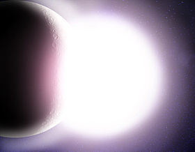 Ѕвезда